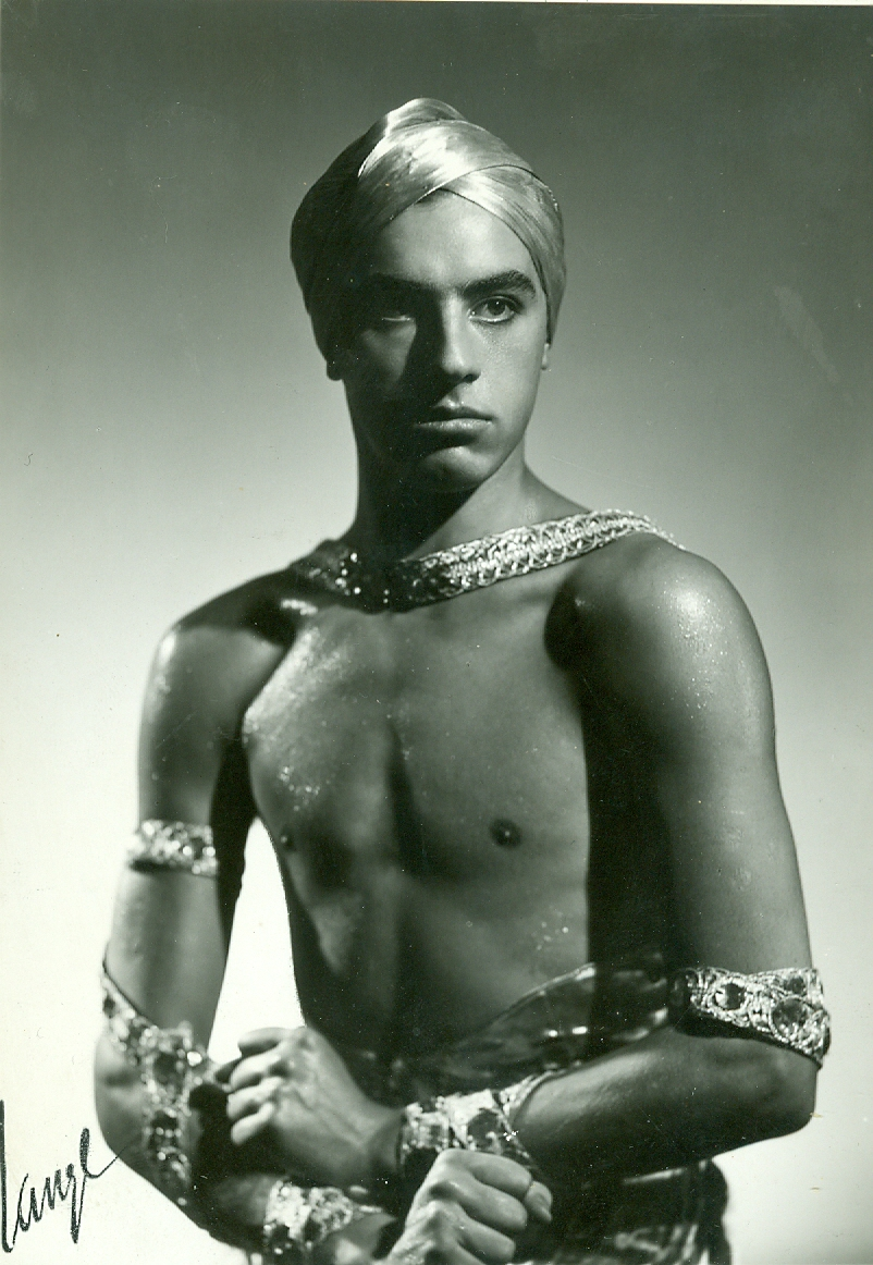 Teddy Rhodin i kostym